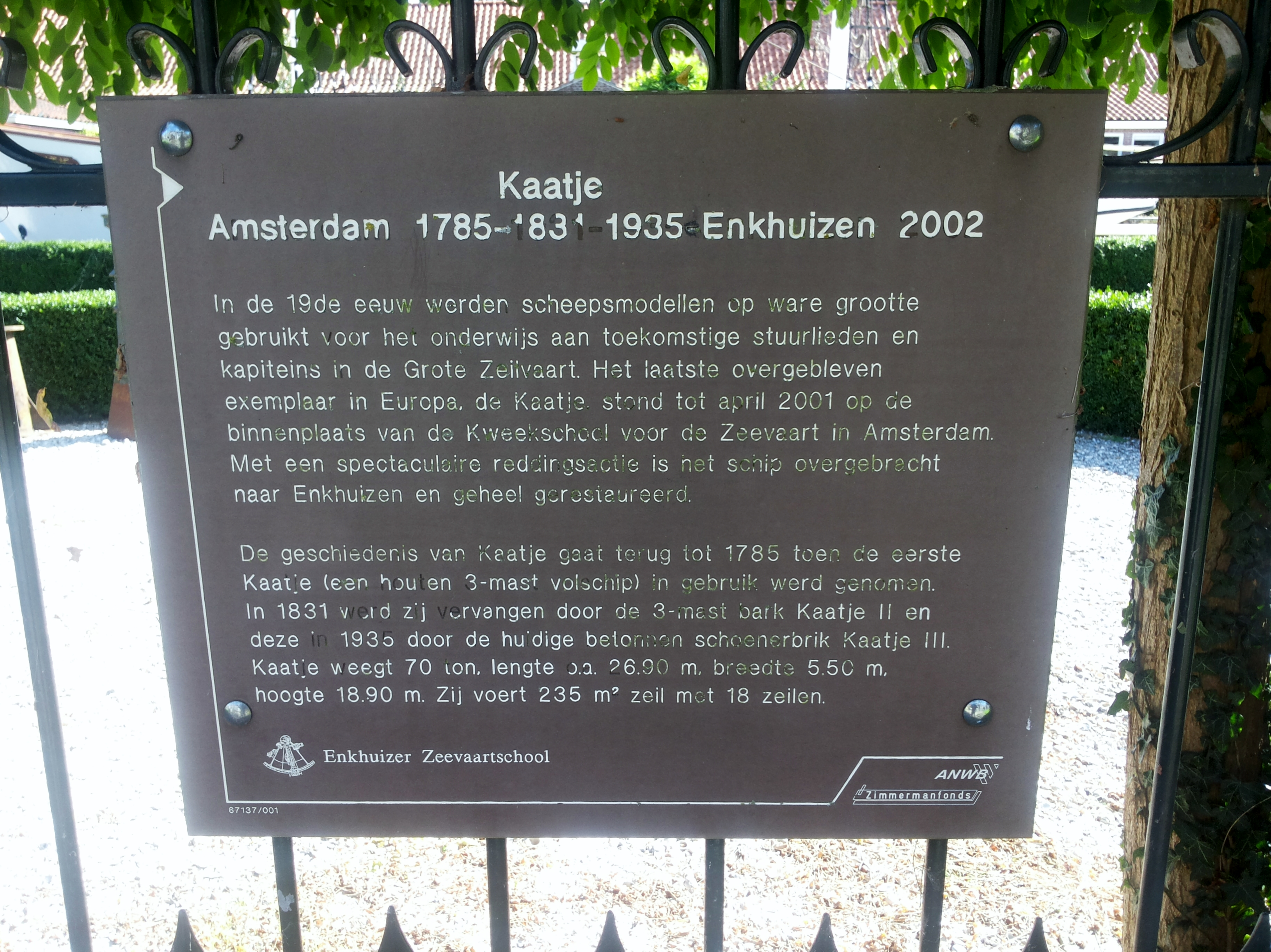 Erläuterung zur "Kaatje", Enkhuizer Zeevaartschool